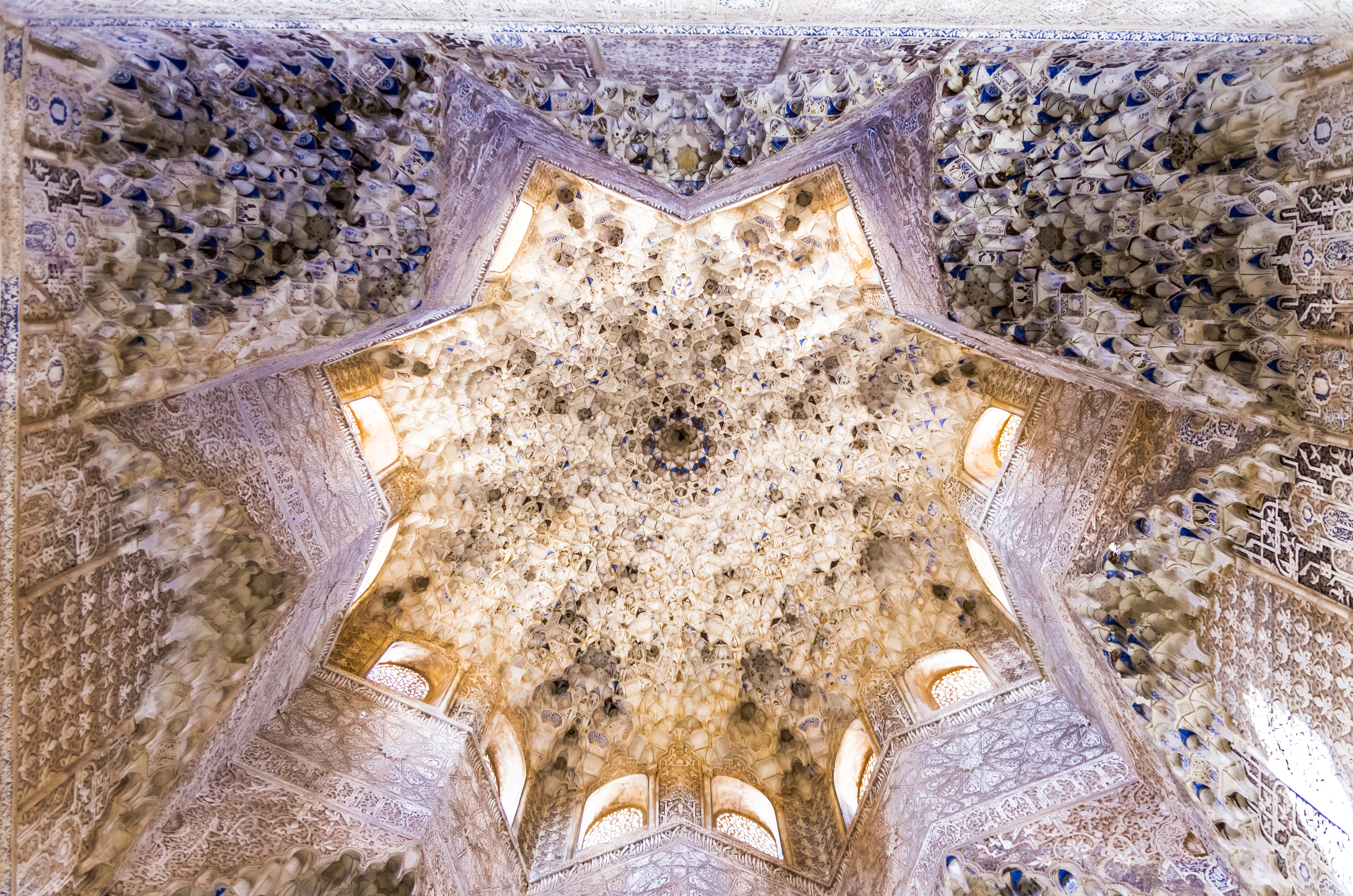 Techos Alhambra